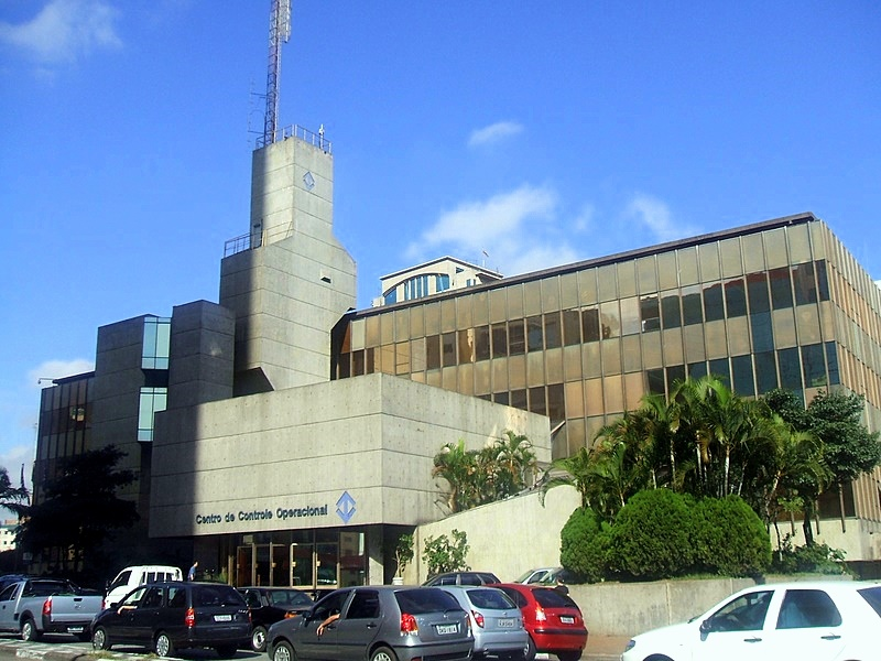 Centro de Controle Operacional do Metrô de São Paulo, no bairro do Paraíso (distrito da Liberdade), cidade de São Paulo, Brasil.